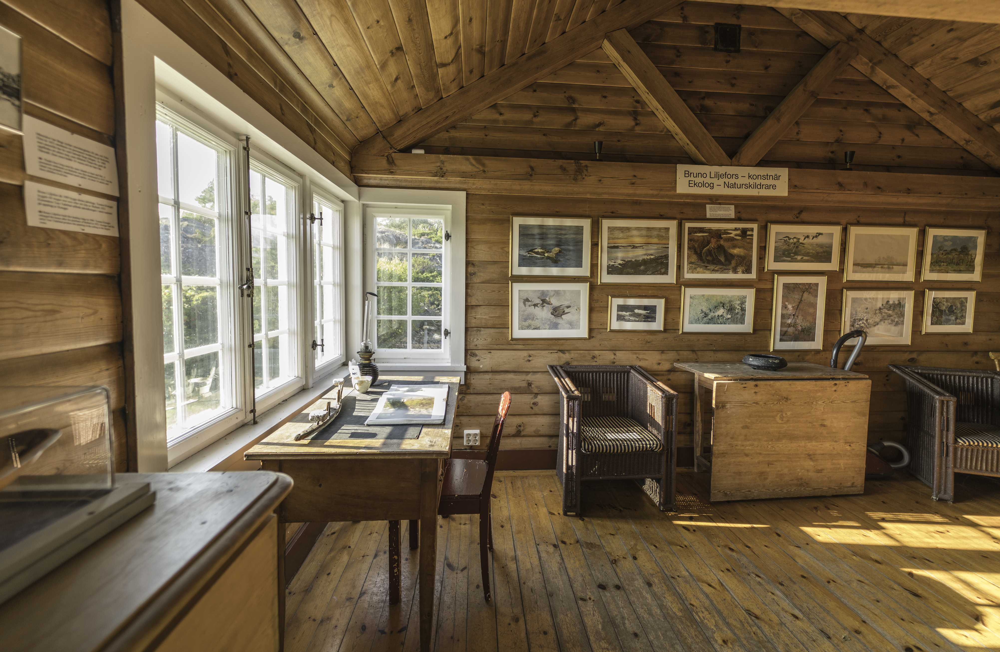 Foto Johan Ander